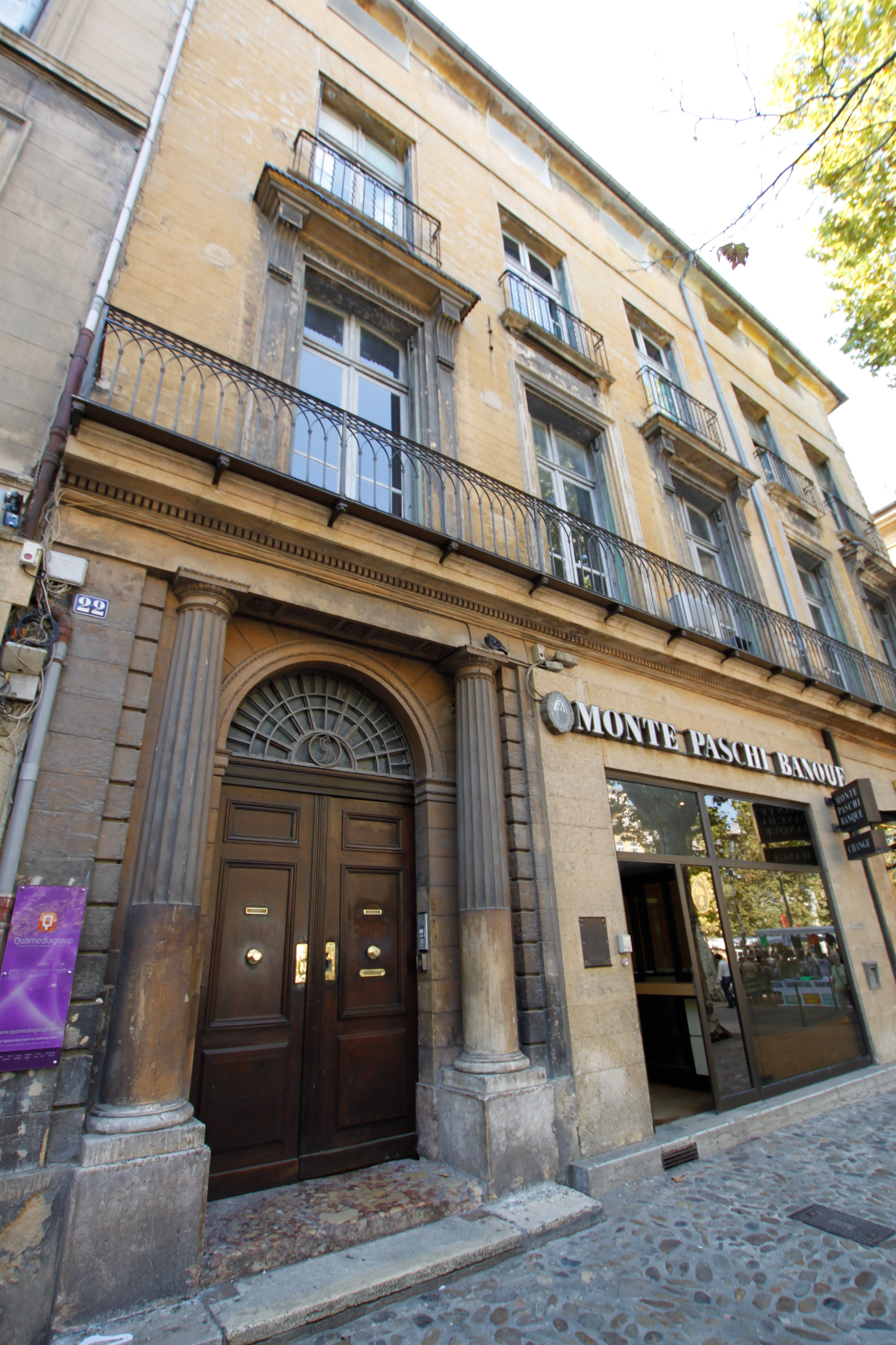 Hôtel de Gueydan, 22 cours Mirabeau, Aix-en-Provence (France). .